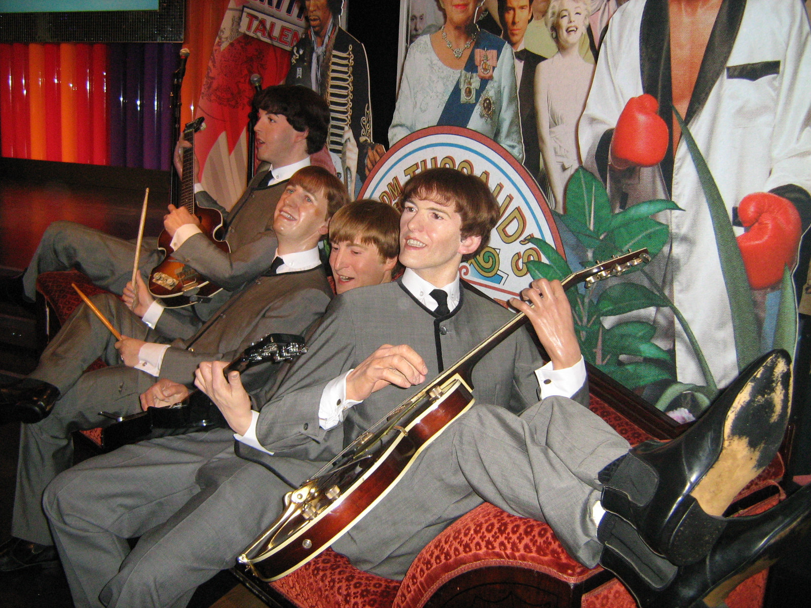 Beatles bei Madame Tussaud's